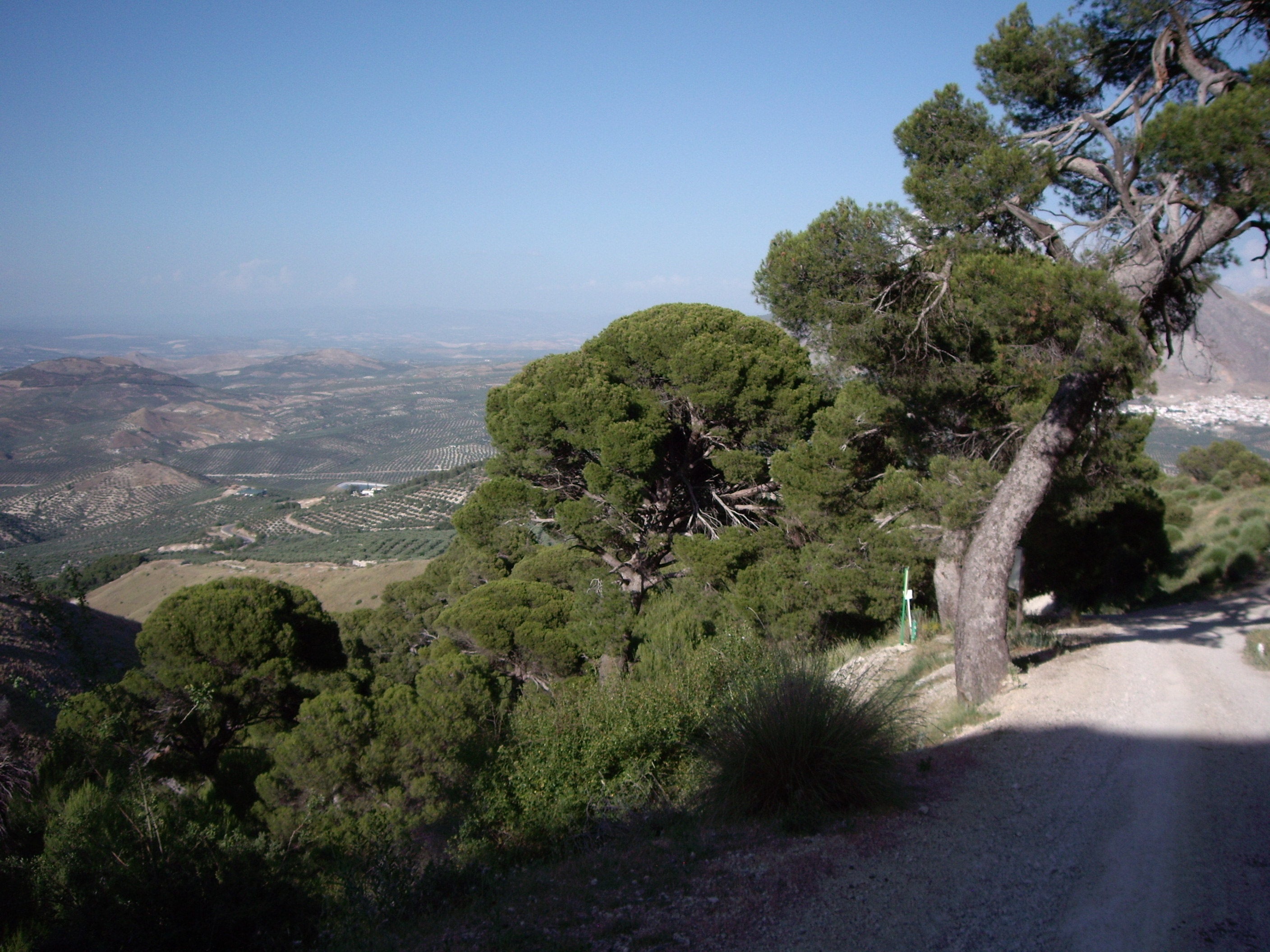 Catalogado como Monumento Natural; dentro del Parque Natural de Sierra Mágina se encuentra el bosque de Pinos Carrasco Centenarios, que responde al nombre de "Pinar de Cánava"; una verdadera joya botánica natural, con la que tenemos la fortuna de contar, en la Naturaleza Silvestre de nuestra Provincia de jaén. El Pinar de Cánava, además de una auténtica Joya Botánica como es, cuenta entre sus pobladores, con especies faunísticas tan importantes como el Gavilán. This is a photography of a Special Area of Conservation in Spain with the ID: ES6160009. Natura2000 entry, EEA entry